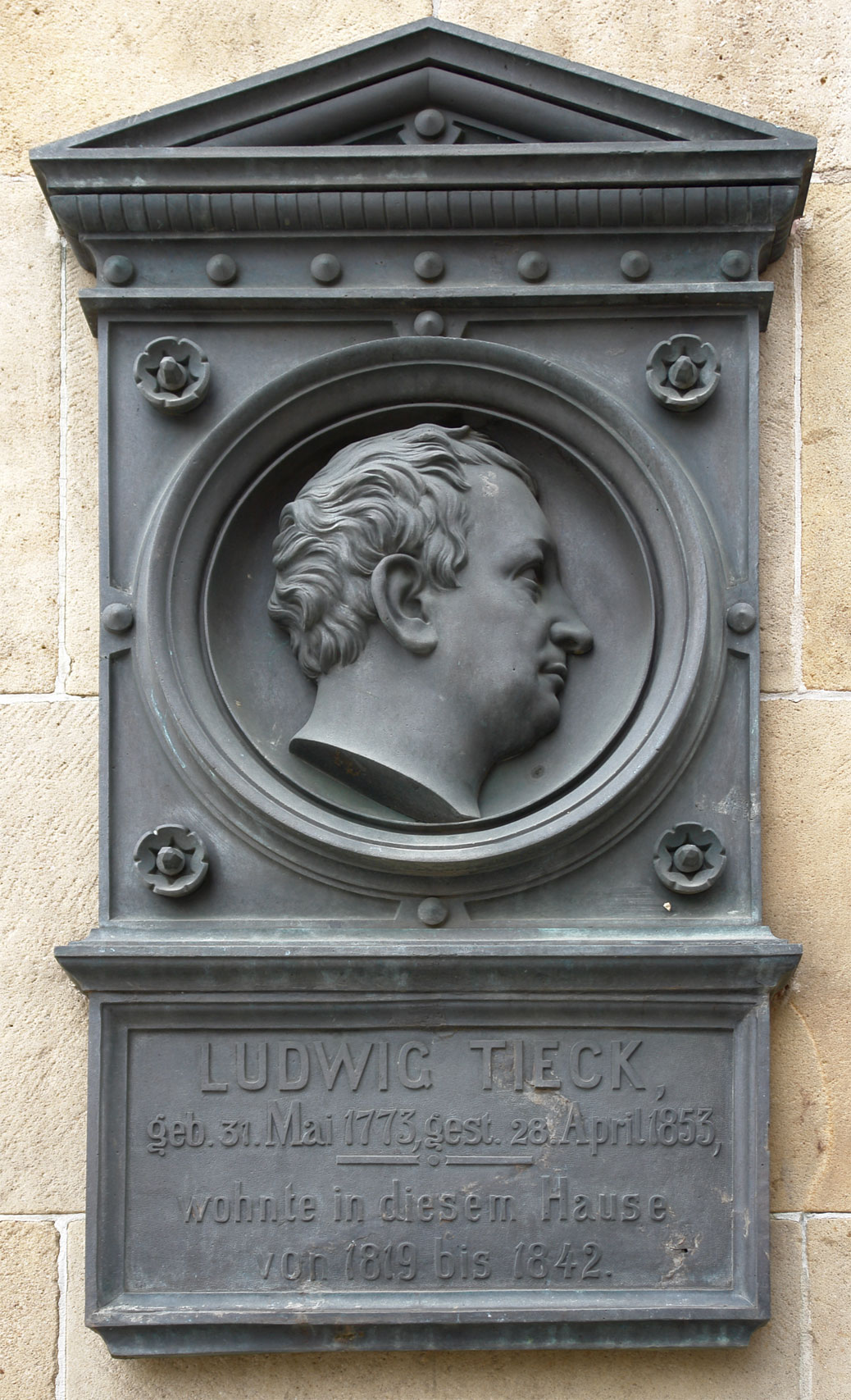 Ludwig Tieck Gedenktafel in Dresden am Gebäude neben der Kreuzkirche